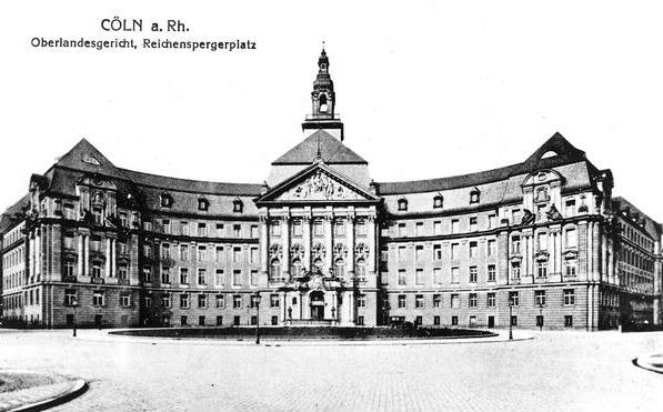 Oberlandesgericht Koln, 1910